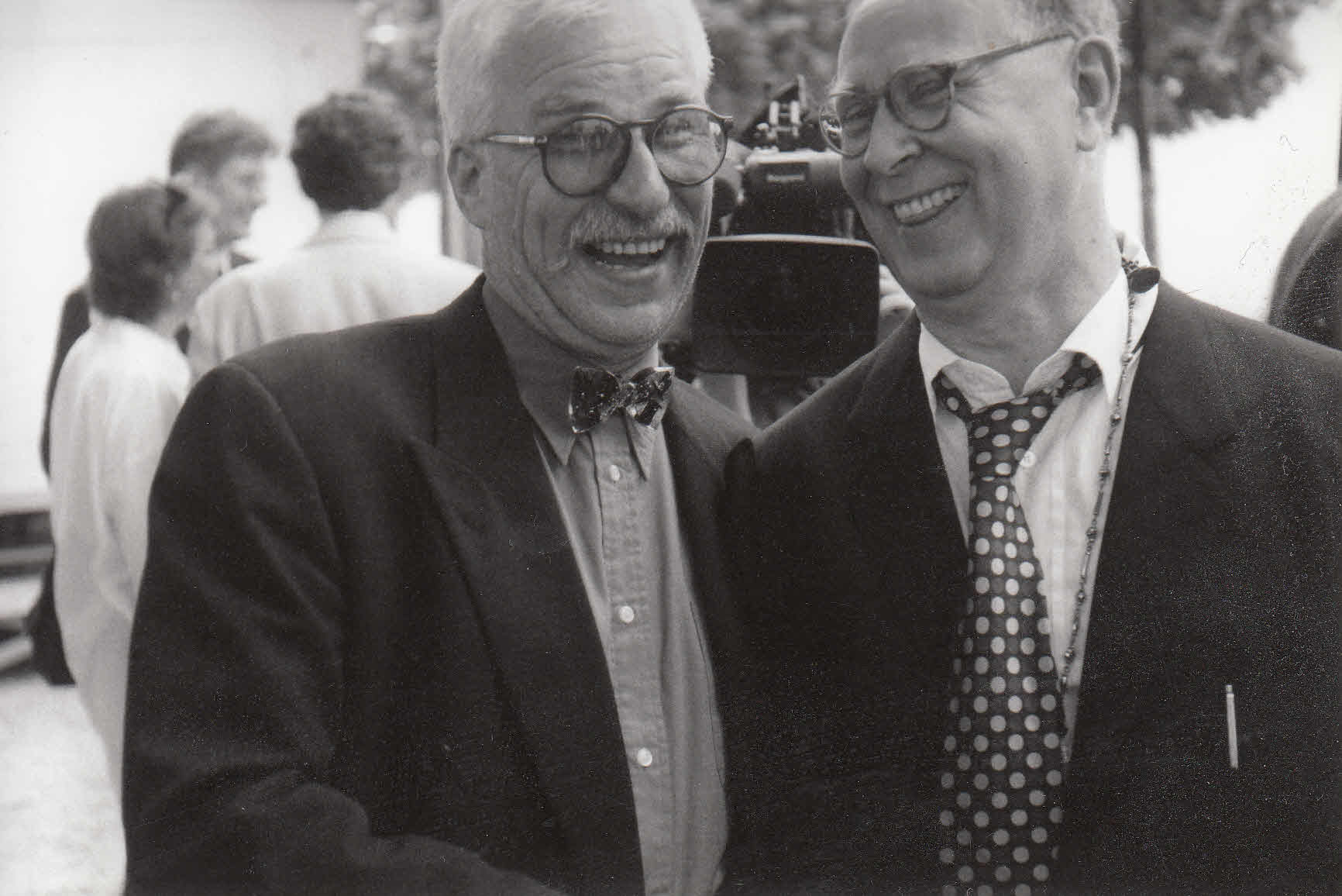 Tutti Palettibesitzer und bester Kunde